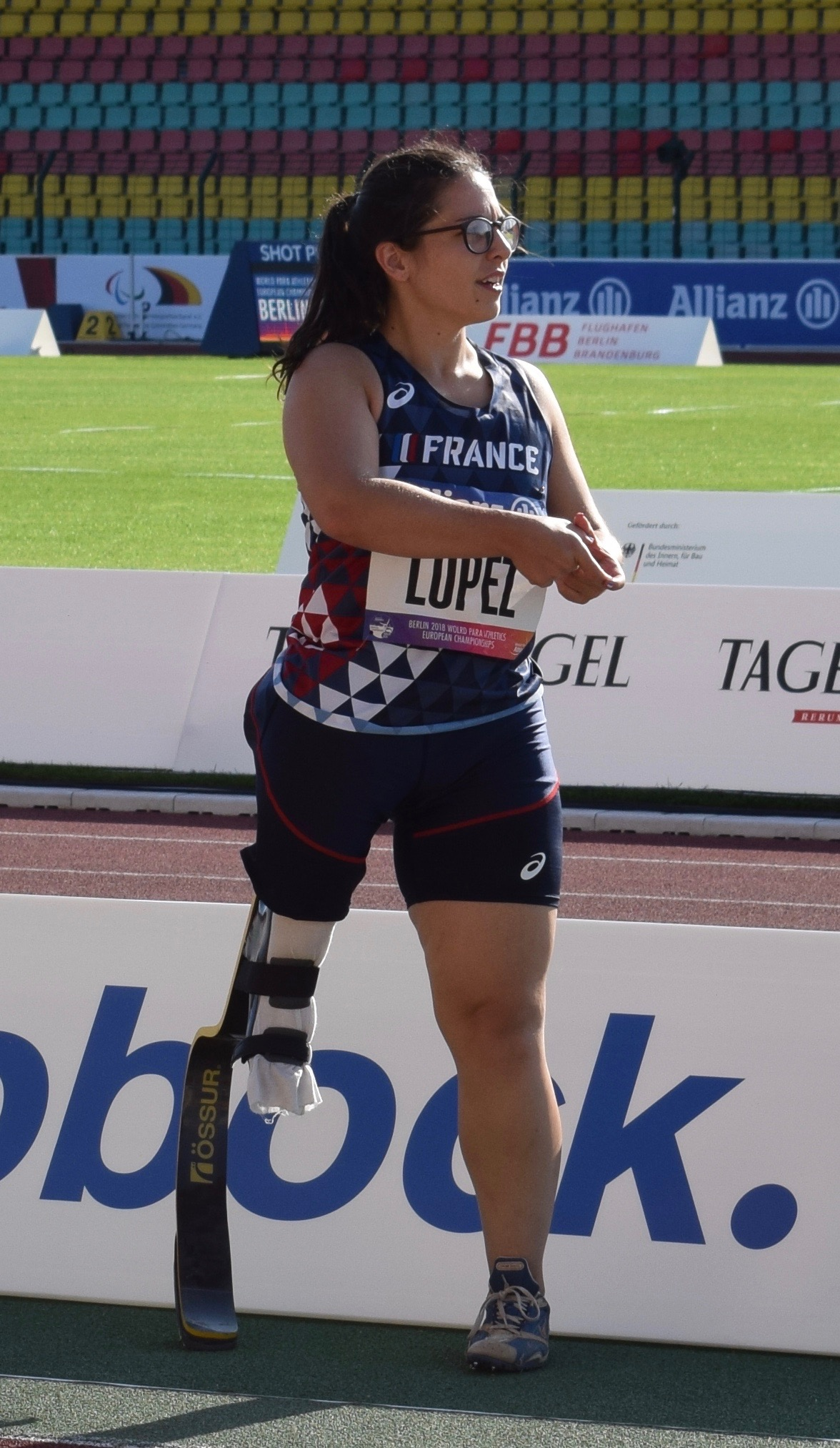 Orianne Lopez Berlin 2018